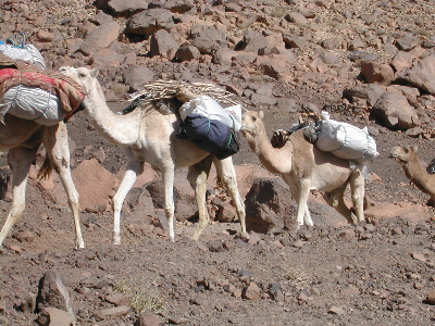 Menare Algérie, Camelus dromedarius